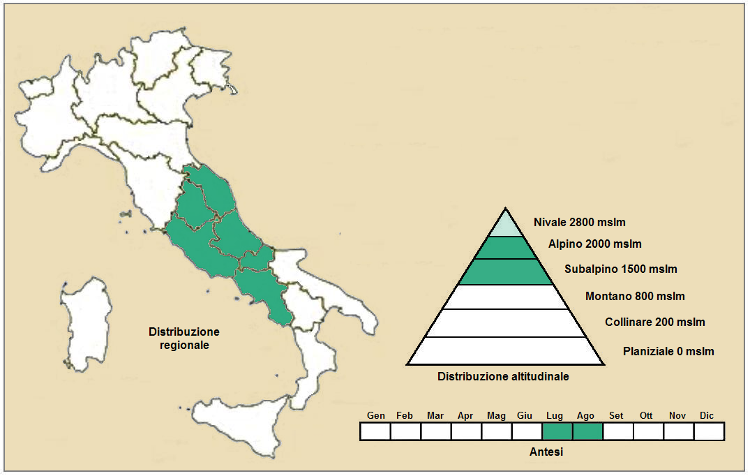 Achillea barrelieri subsp barrelieri - Distribuzione